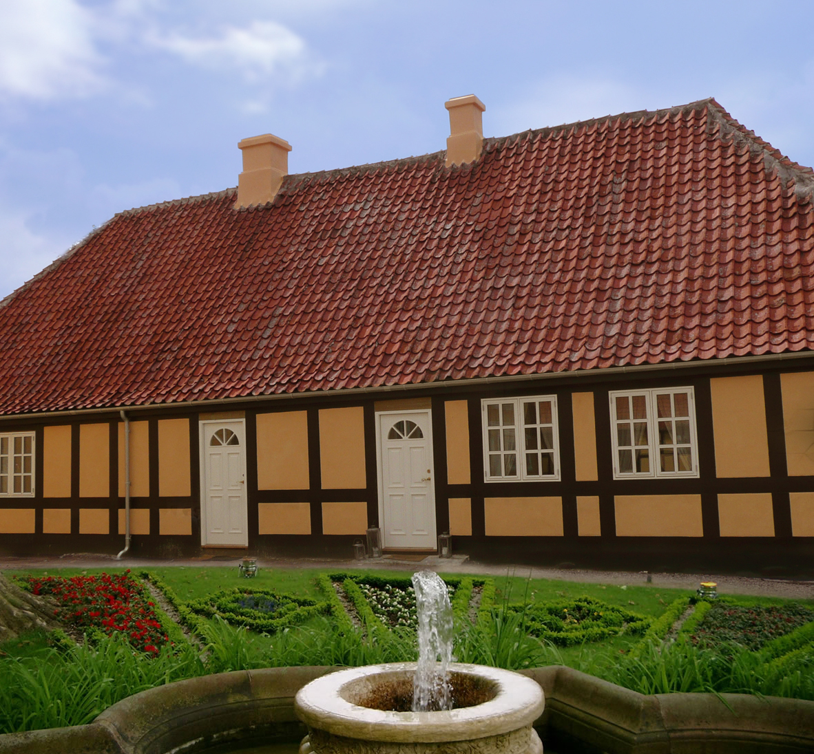 En del av Skrøbelev Gods der blev bygget i 1669